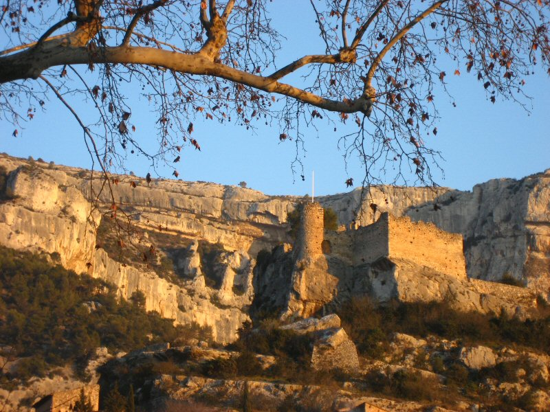 Ancien château de Pétrarque (Fontaine-de-Vaucluse, Vaucluse, France).